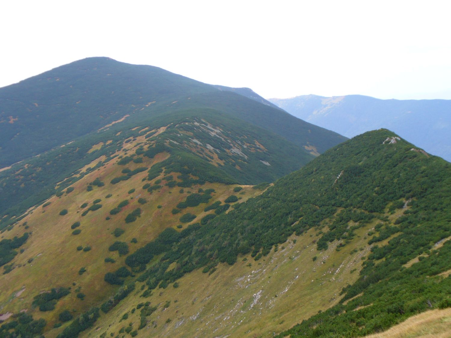 Kozie chrbty (z prawej z przodu) i Veľký Gápeľ (najwyższy) od strony schroniska im. Gen. R. Štefánika